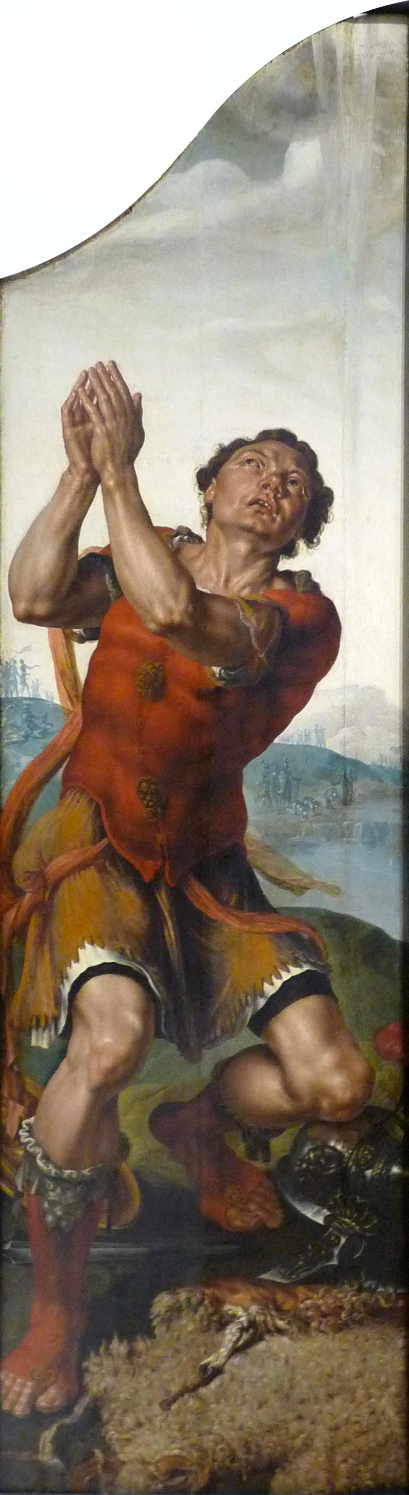 Gédéon (vers 1550), huiles sur bois de Martin van Heemskerck, au Musée des Beaux-Arts de Strasbourg. A l'origine, un tableau (perdu)avec la Vierge était placé entre les deux panneaux.